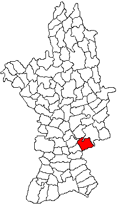 Categorie:Hărţi ale judeţului Olt